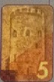 Вадзяны знак банкноты ў 5 BYN